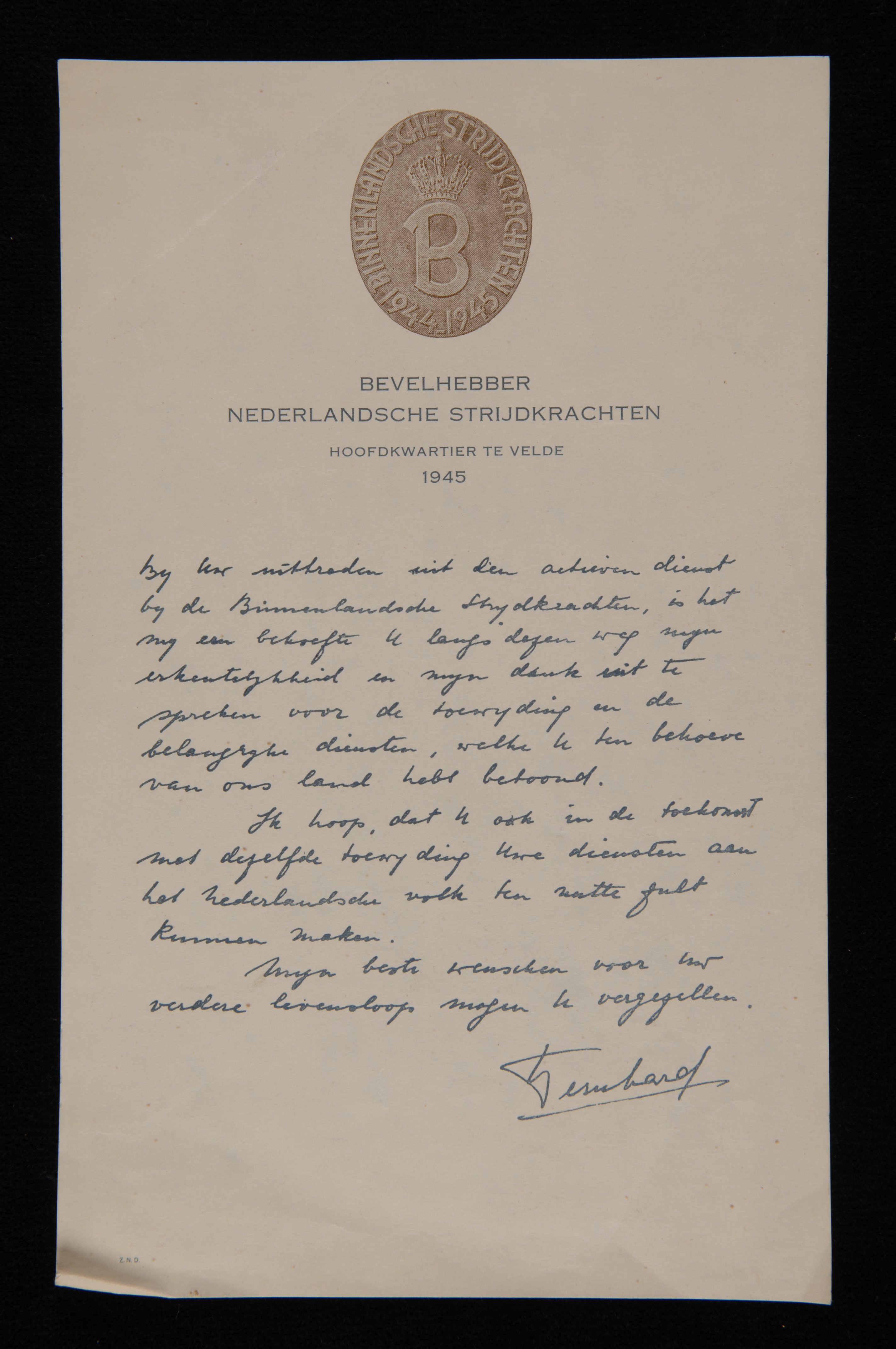 Dankbetuiging van Prins Bernhard aan leden van de Nederlandsche Strijdkrachten.